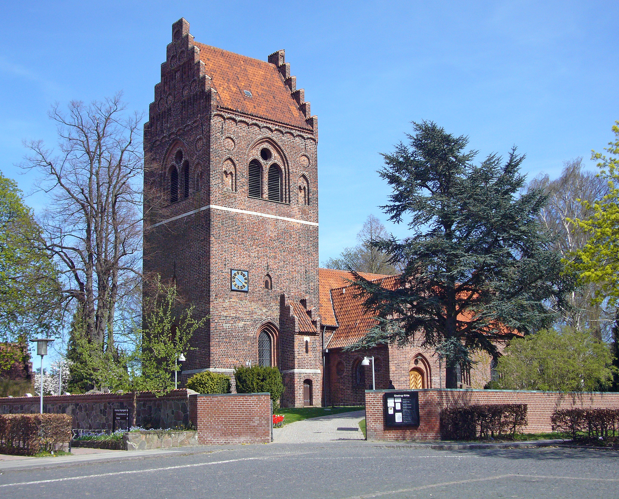 Glostrup Kirke, Glostrup, Denmark. Glostrup Kirke